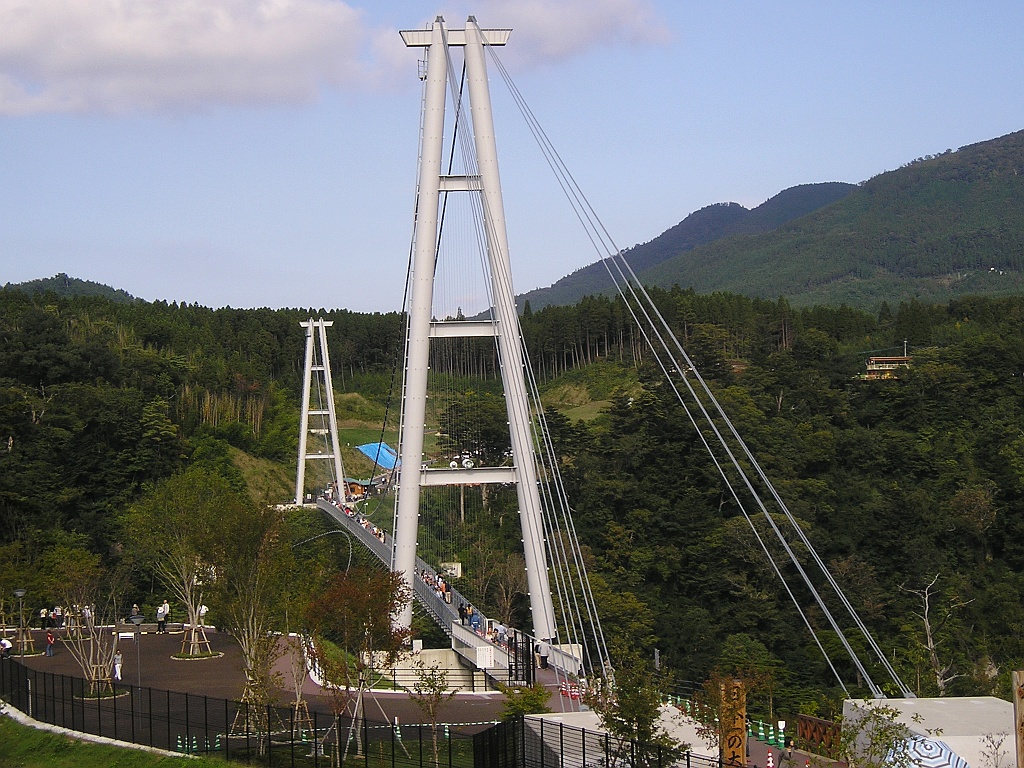 大分県玖珠郡九重町の九酔渓にある九重"夢"大吊橋。 Photo by Si-take. Oct.2007 Category:橋画像Category:大分県の画像